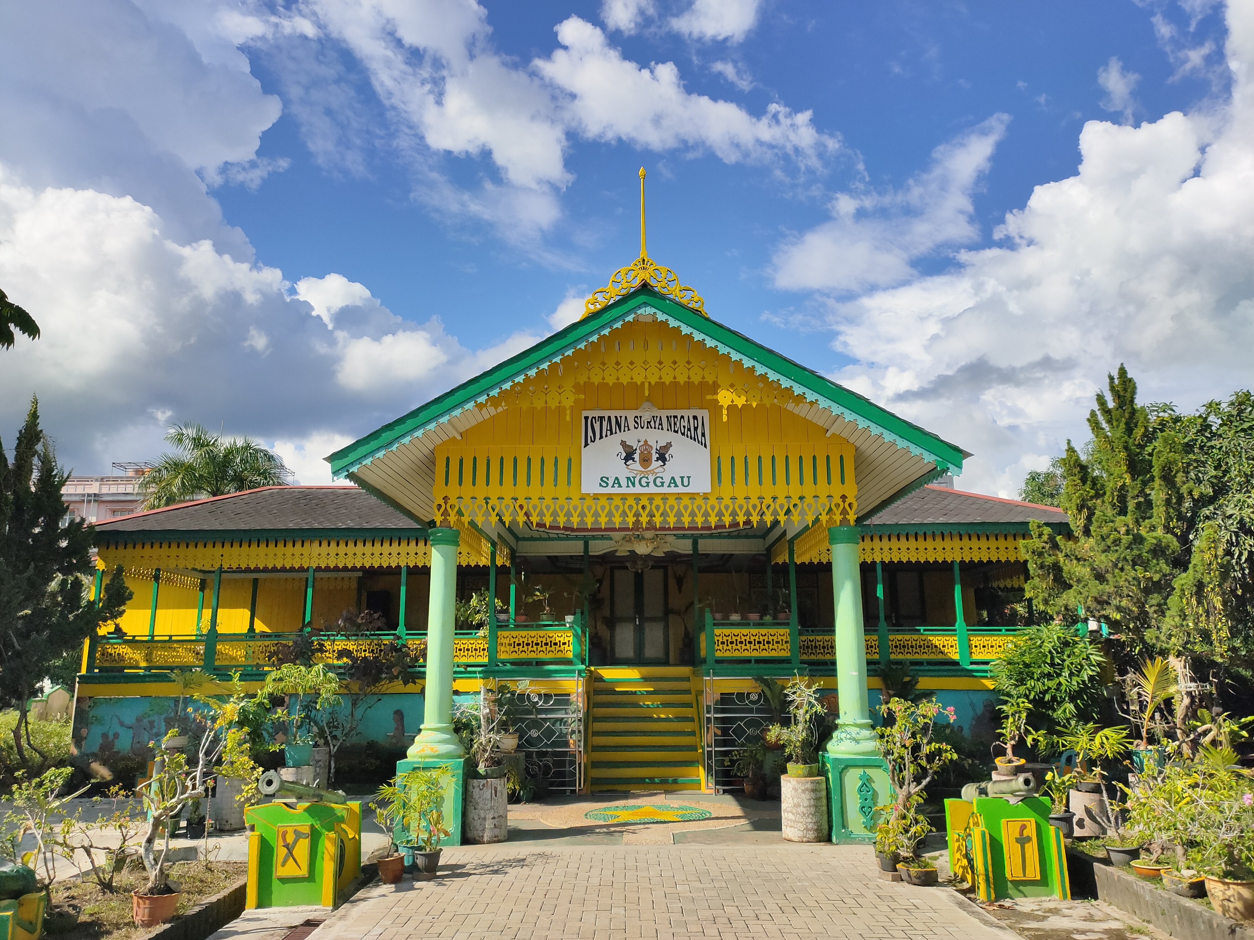 Istana Surya Negara Kerajaan Sanggau di Kabupaten Sanggau, Kalimantan Barat